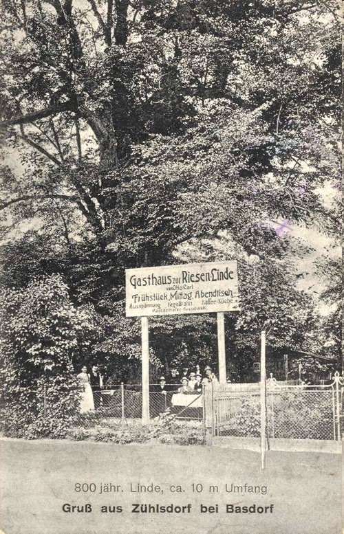 Zühlsdorf Gemeinde Mühlenbecker Land